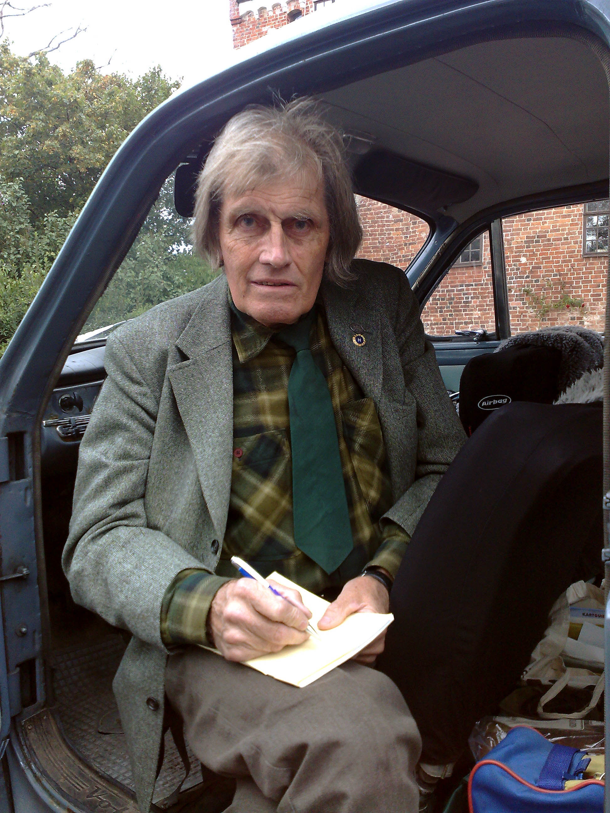 Eric Mårtensson, folkbildare och museiman från Skåne.